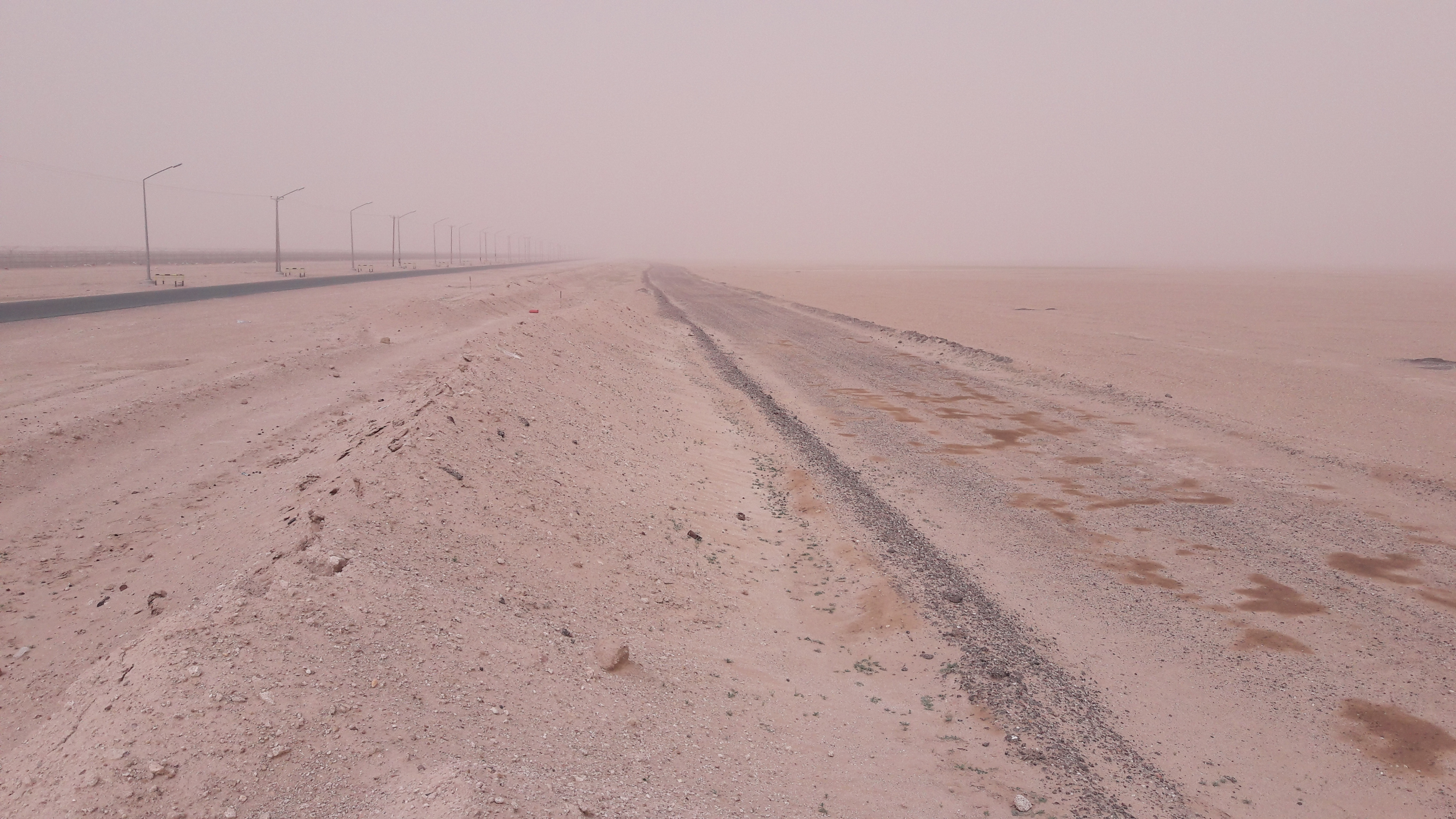 Zone sommitale, en frontière koweito-saoudienne